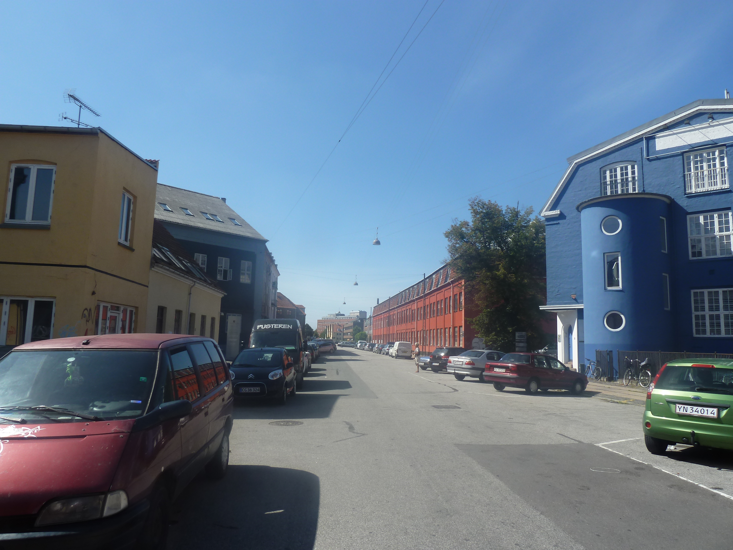 The street Aldersrogade in Østerbro in Copenhagen.